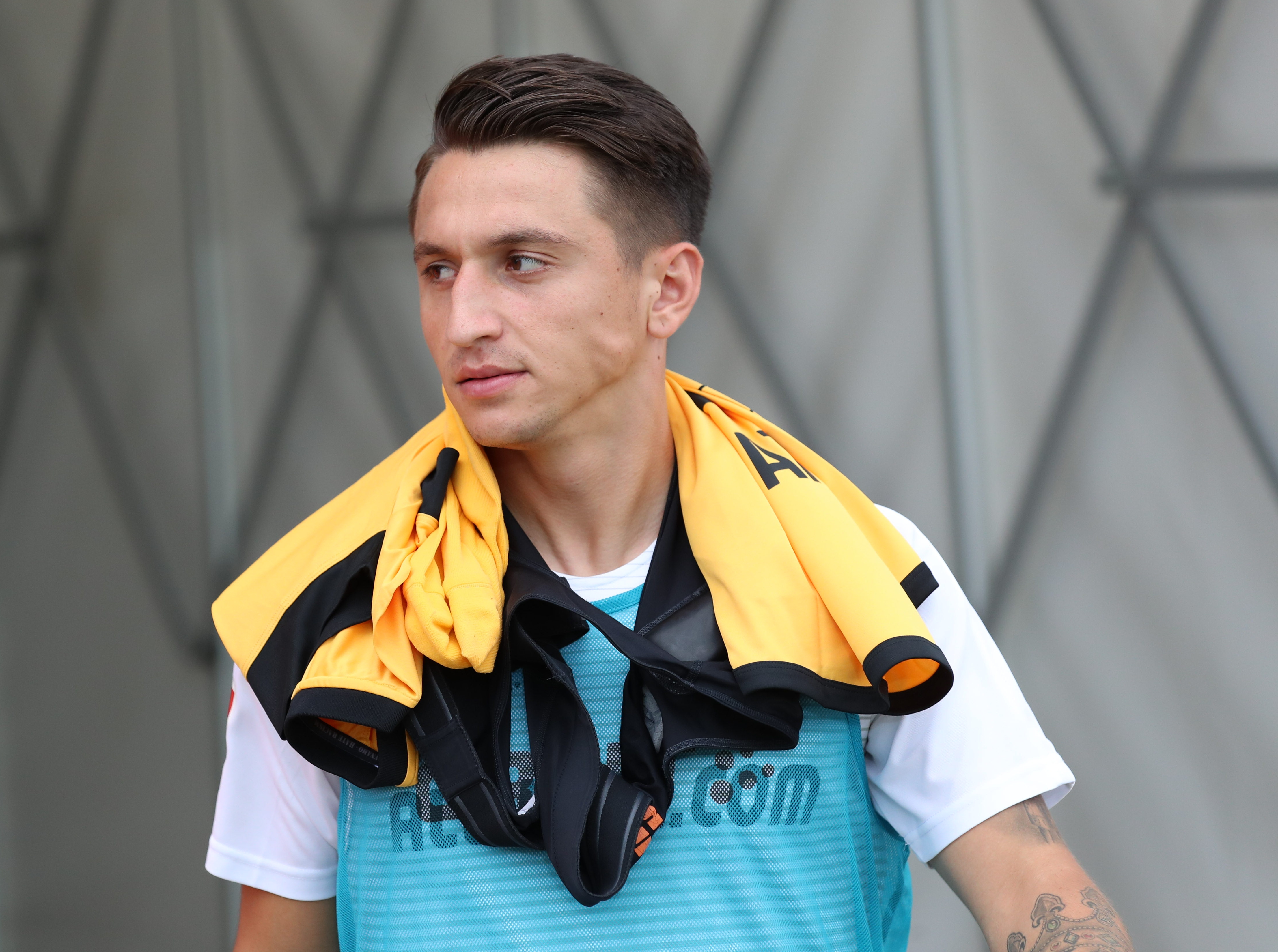 DFB-Pokal 2019/20, 1. Hauptrunde, TuS Dassendorf gegen SG Dynamo Dresden 0:3 (0:1)